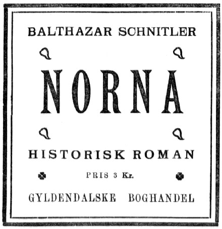 Avertissement for Balthazar Schnitlers "Norna". Her efter Aftenposten 12.12.1900